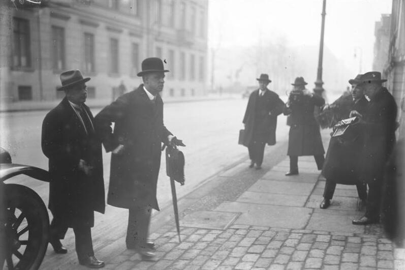 Der Carnegie-Friedenspreis für Sir Eric Drummond, dem Generalsekretär des Völkerbundes in Genf. Der von dem Niederländer Wateler gestiftete Friedens-Preis für 1931 im Betrage von 25.000 holl. Gulden wurde Sir Eric Drummond als Anerkennung seiner Dienste für die Organisation der Internationalen Gemeinschaft verliehen. Sir Eric Drummond hat grosszügigerweise den Betrag dem Direktorium zur Förderung der Völkerbundsziele zur Verfügung gestellt.